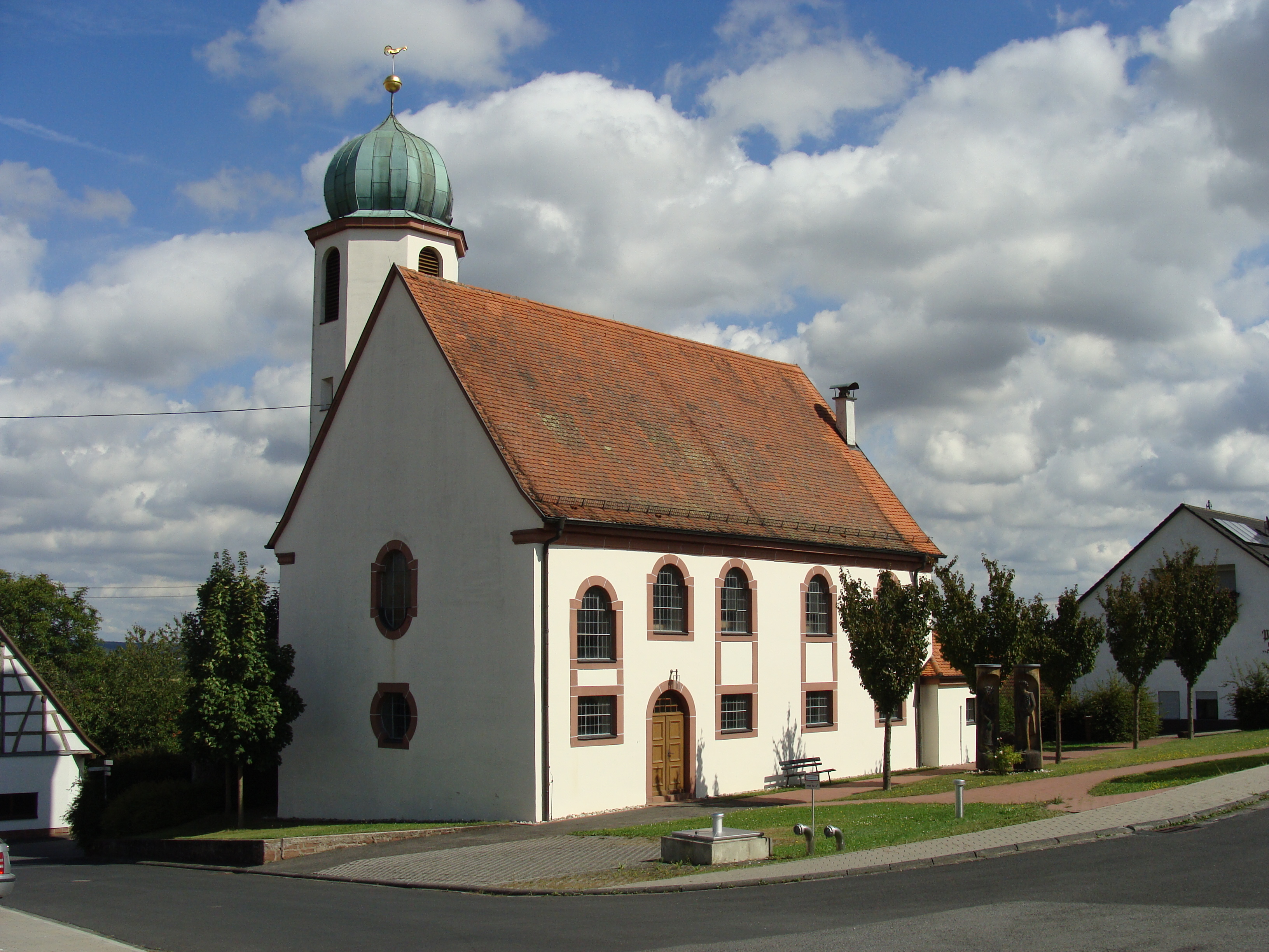 Christuskirche in Glasofen (Marktheidenfeld)